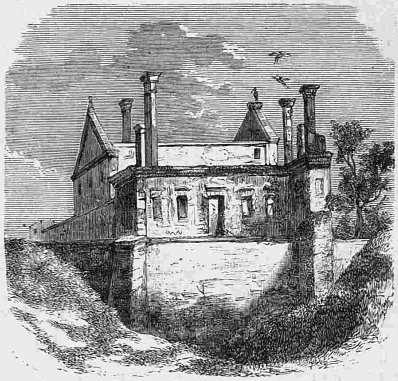 Руїни замку Чорторийських у Чорторийську.